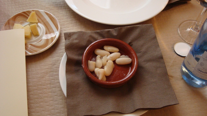 Una muestra de faba de la DOP Faba Asturiana en la cata de fabas para el Certamen de la Faba Asturiana de Denominación de Origen. Celebrado en Grado, Asturias con la colaboración con el Consejo Regulador de la Denominación de Origen de la Faba Asturiana. Las muestras están cocinados solo con agua y sal por los criterios del Consejo de la Denominación de Origen Faba de Asturias.